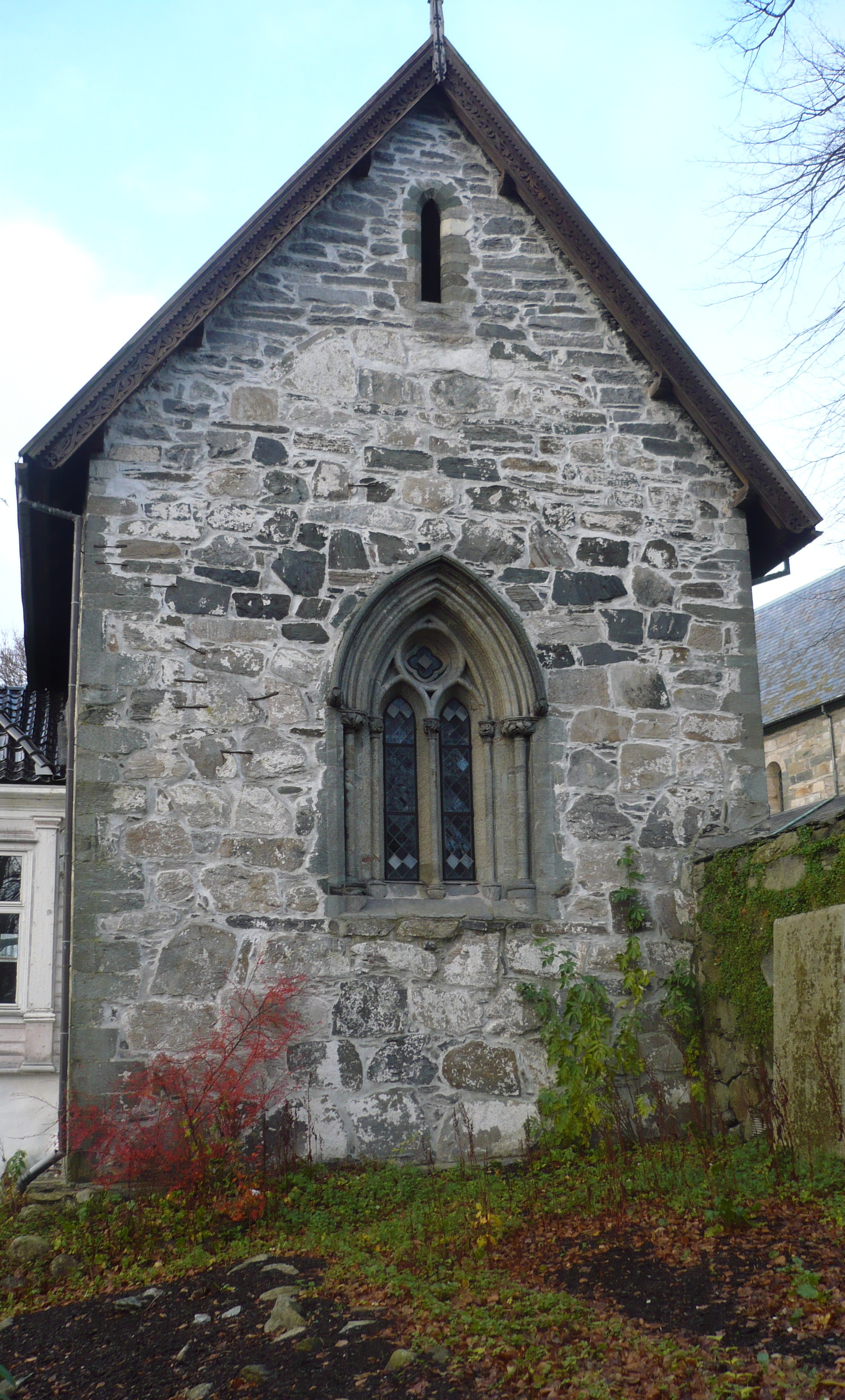 Østfronten til Bispekapellet